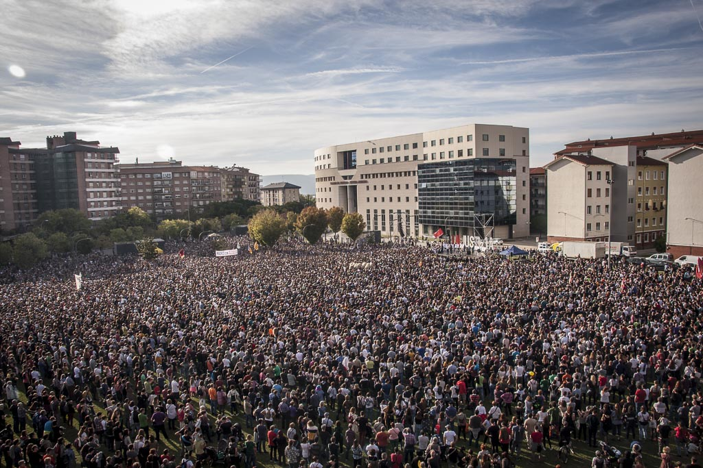 Altsasuko auziko azken epaiaren kontrako protesta Iruñean